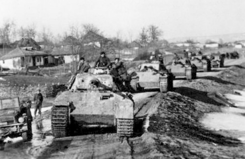 Rumänien, Kolonne von Panzer V (Panther) Scherl Bilderdienst Panzerregiment "Grossdeutschland" ein Angriff im Raum von Jassy Bei den harten Angriffs- und Abwehrkämpfen im Süden der Ostfront steht die Panzergrenadierdivision "Grossdeutschland" stehts im Brennpunkt der Schlacht. Unser Bild zeigt: Das Panzerregiment der Division, das sich in den letzten Tagen ganz besonders ausgezeichnet hatte, rollt zu einem Angriff im Raum von Jassy nach vorn. PK-Aufnahme Kriegsberichter van der Becke 4.5.44 [Herausgabedatum] 1641-44 [Rumänien, bei Iasi.- Kolonne von Panzer V "Panther" der Panzergrenadier-Division "Großdeutschland"]